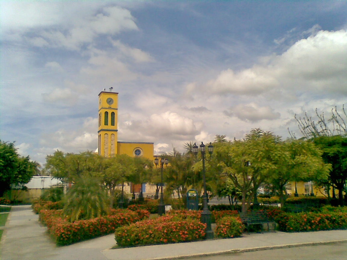 Plaza Bolívar, Municipio Catatumbo